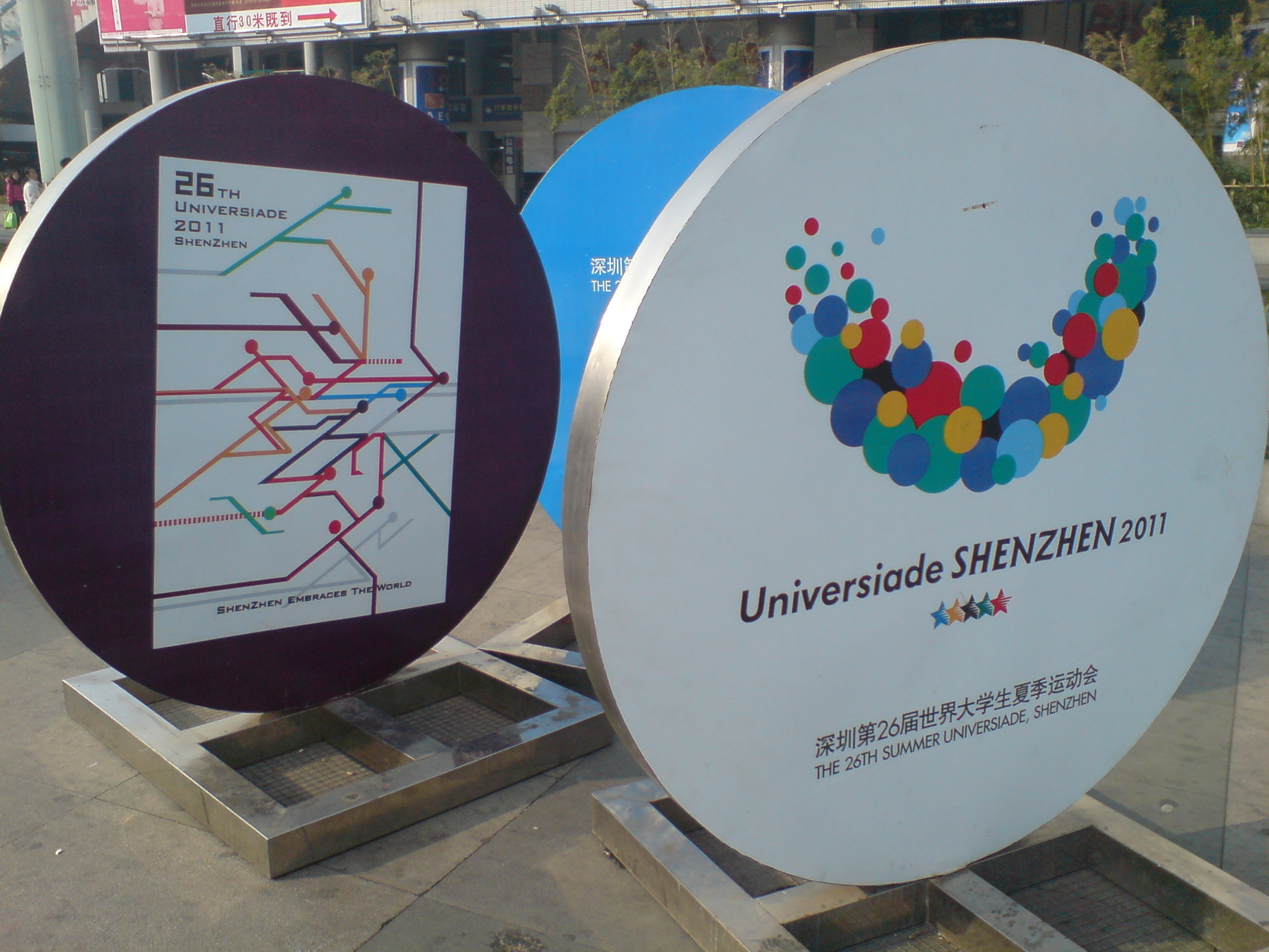 中文（中国大陆）: 深圳2011年大学生运动会的广告